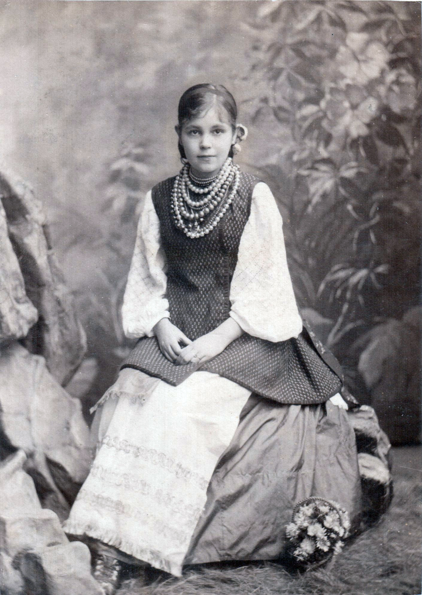 Людмила Старицька. 1882 р. Фото з фондів Музею видатних діячів української культури